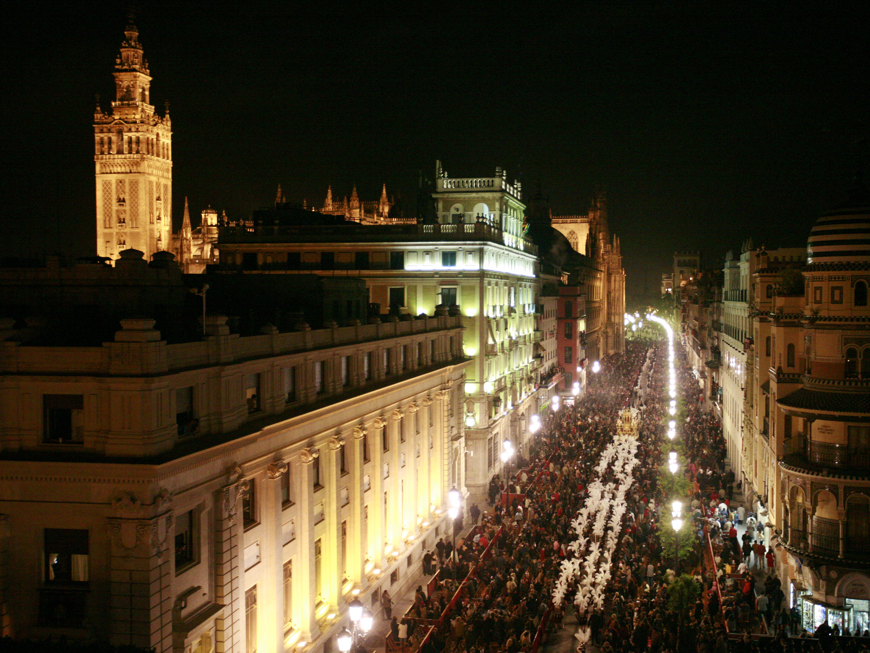 Procesión de los armaos de la Macarena, Semana Santa de 2007. Sevilla